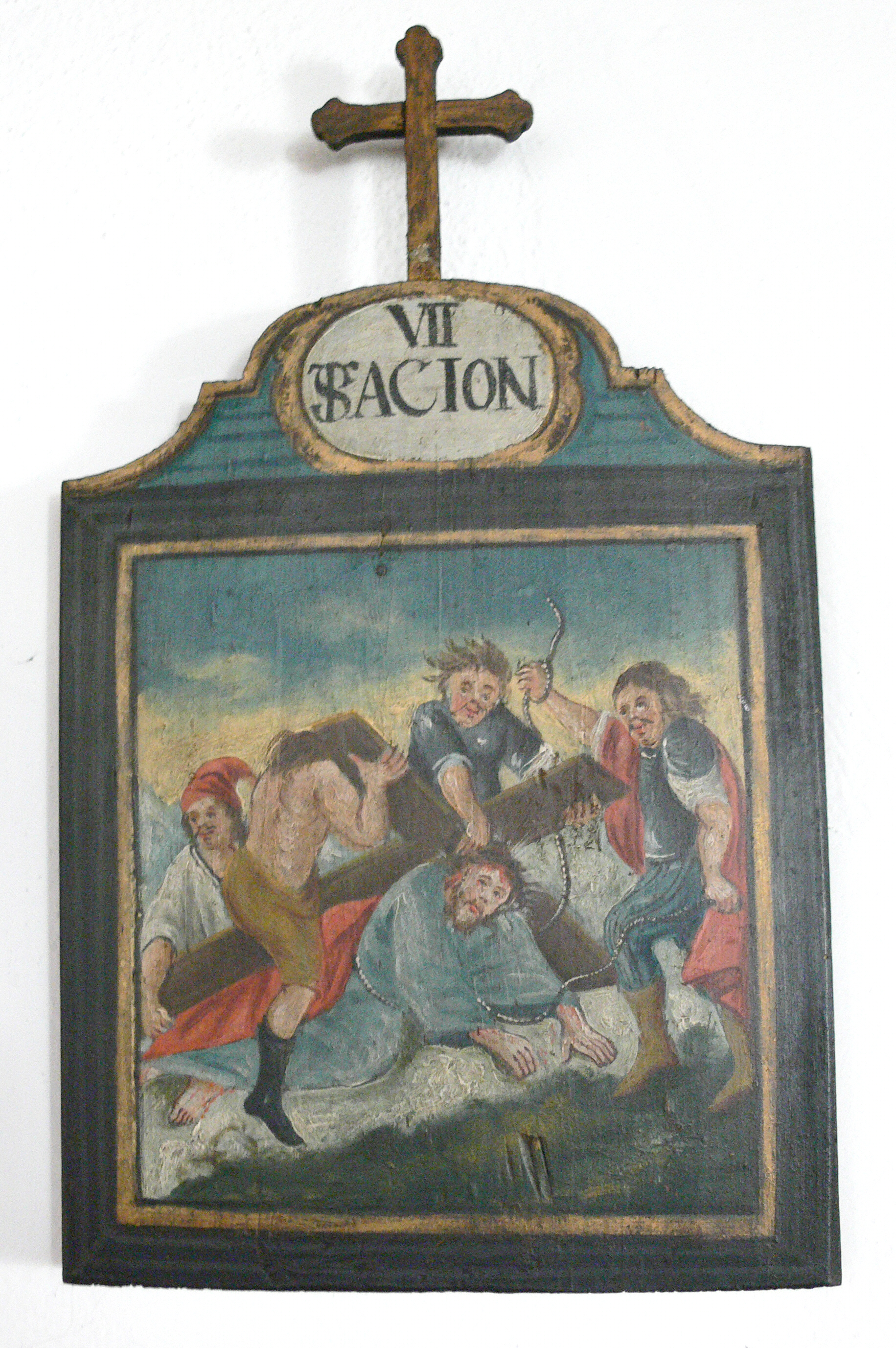 Staig, Ortsteil von Fronreute, Kreis Ravensburg, Baden-Württemberg, Deutschland Kreuzwegstation in der Wallfahrtskapelle Staig